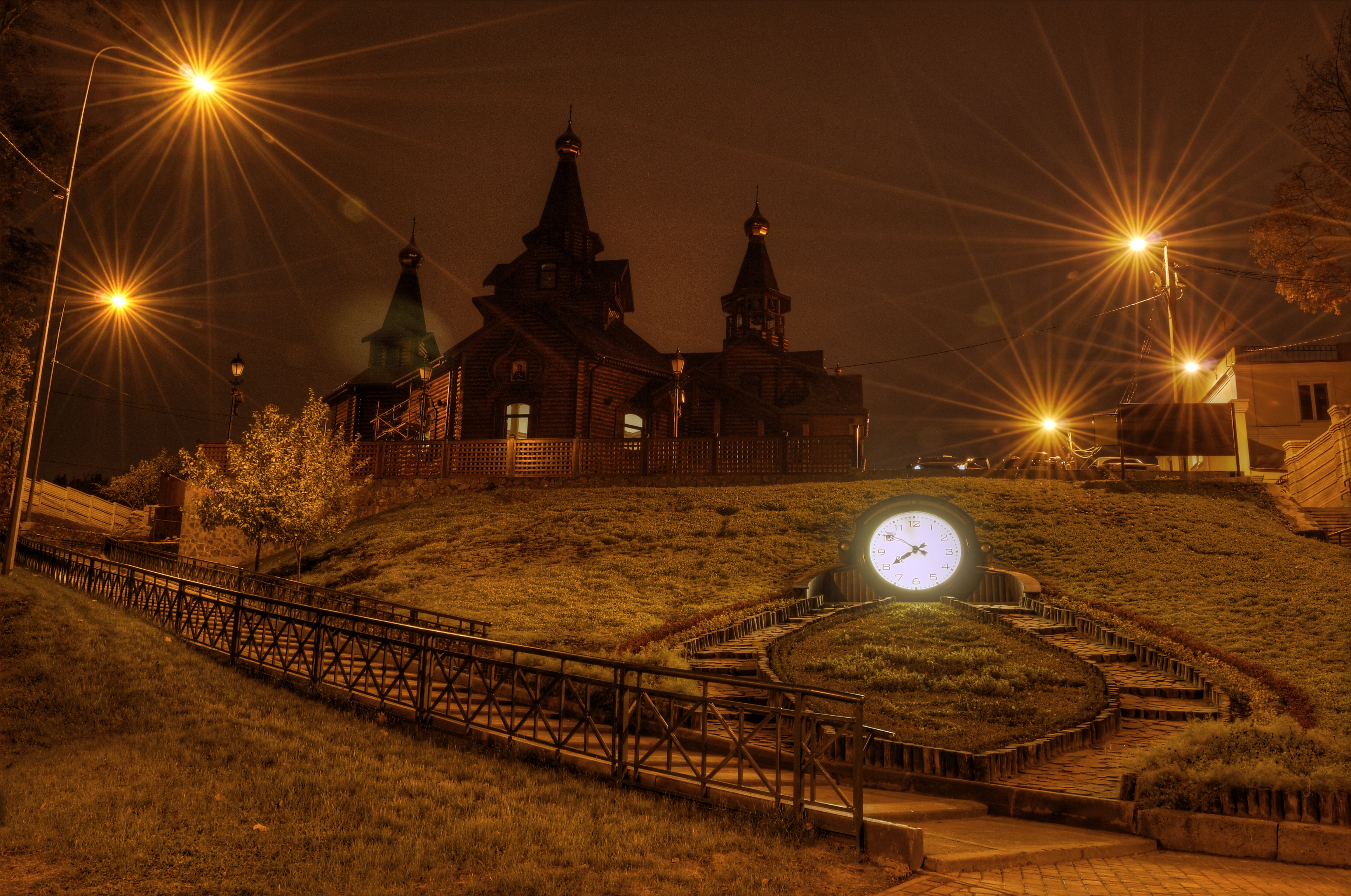 Саржин Яр, ст. метро Ботанический сад, город Харьков, Украина